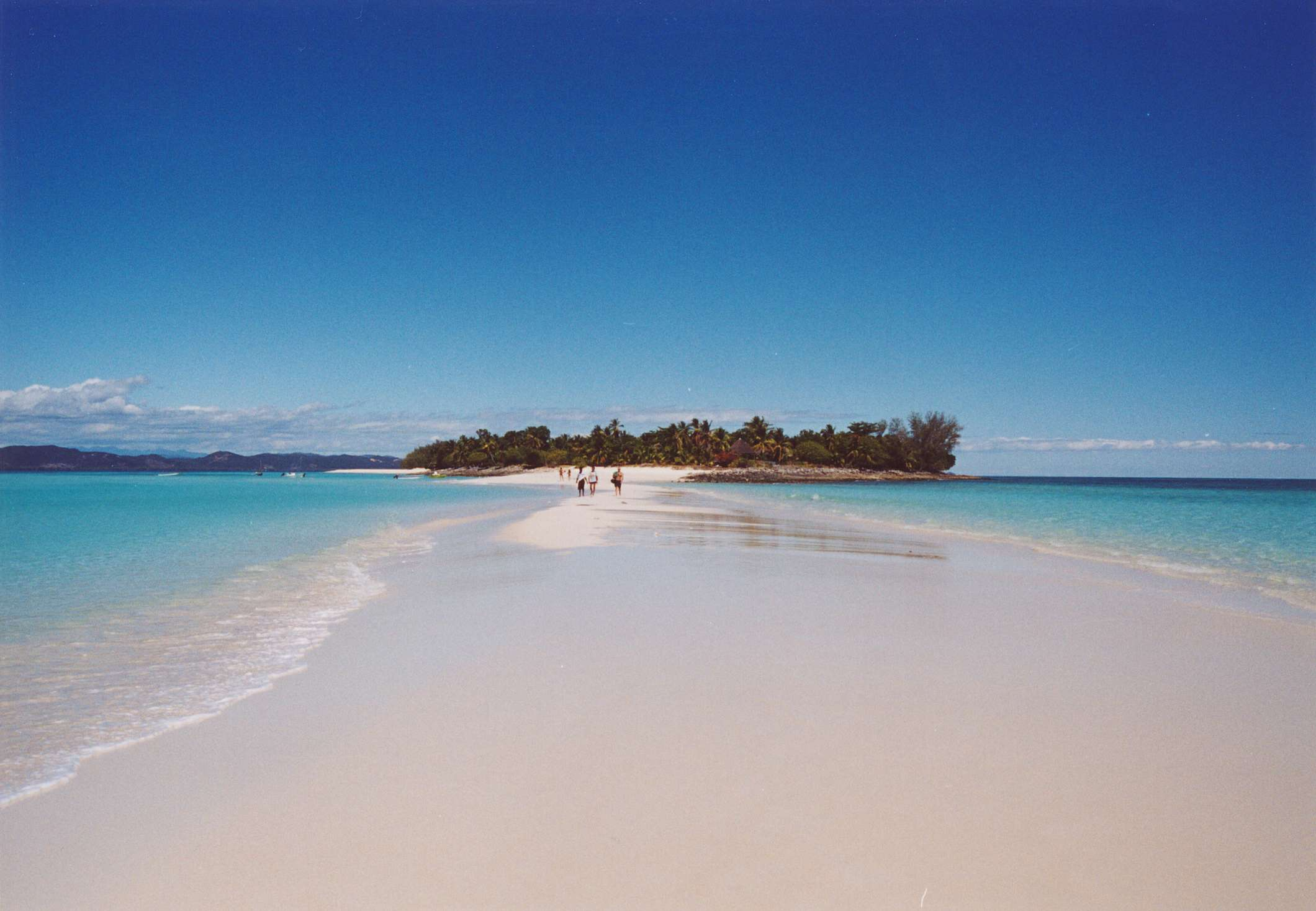 Nosy Iranja, Madagascar